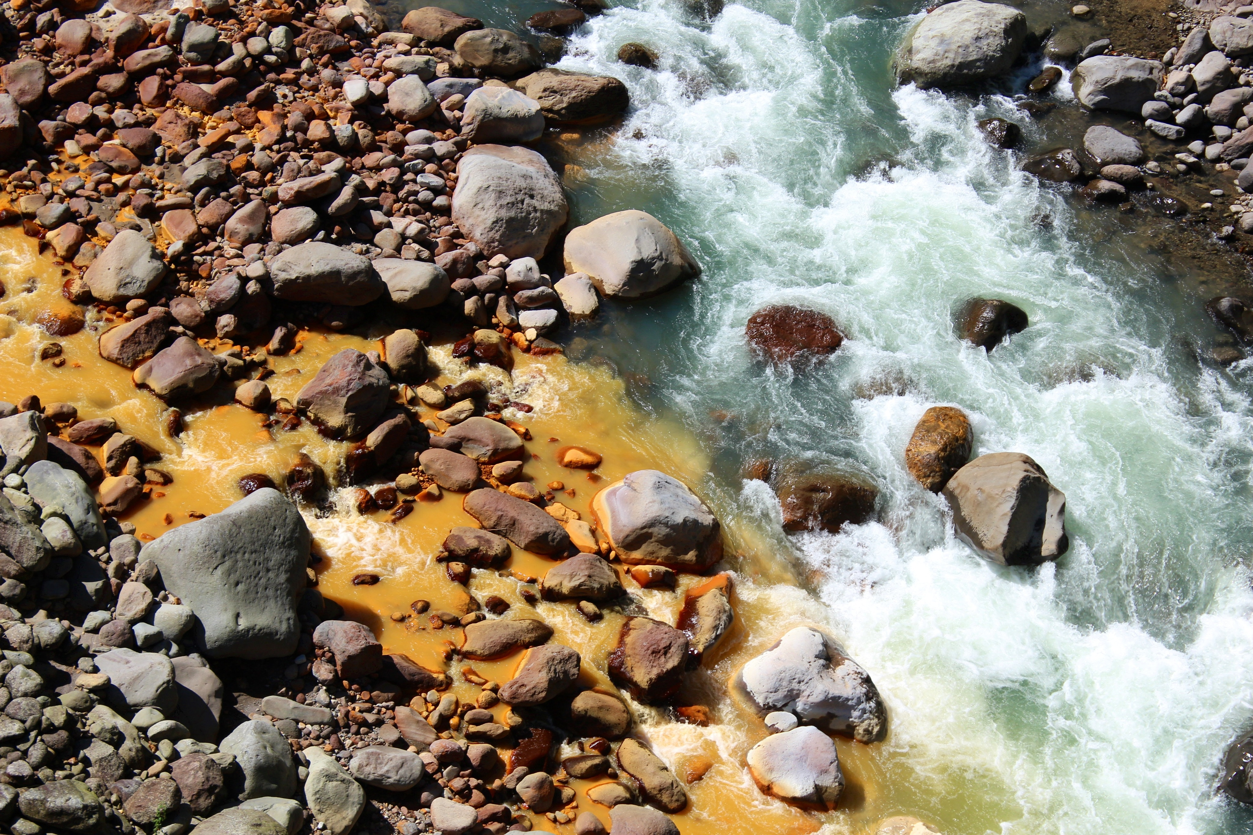 Confluencia del río Sucio con el río Hondura. Parque Nacional Braulio Carrillo, Costa Rica.